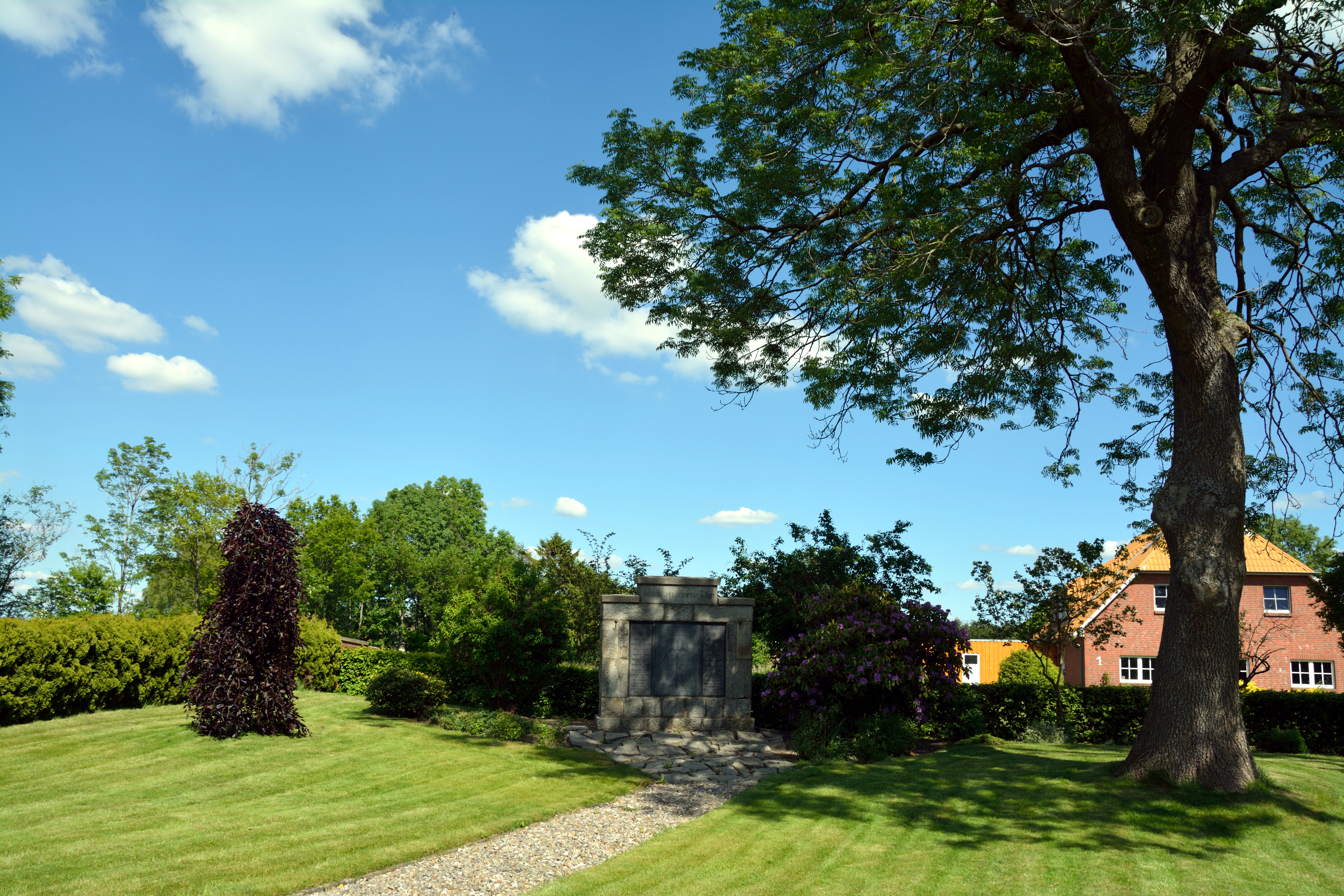 Das Ehrenmal in Vaalermoor